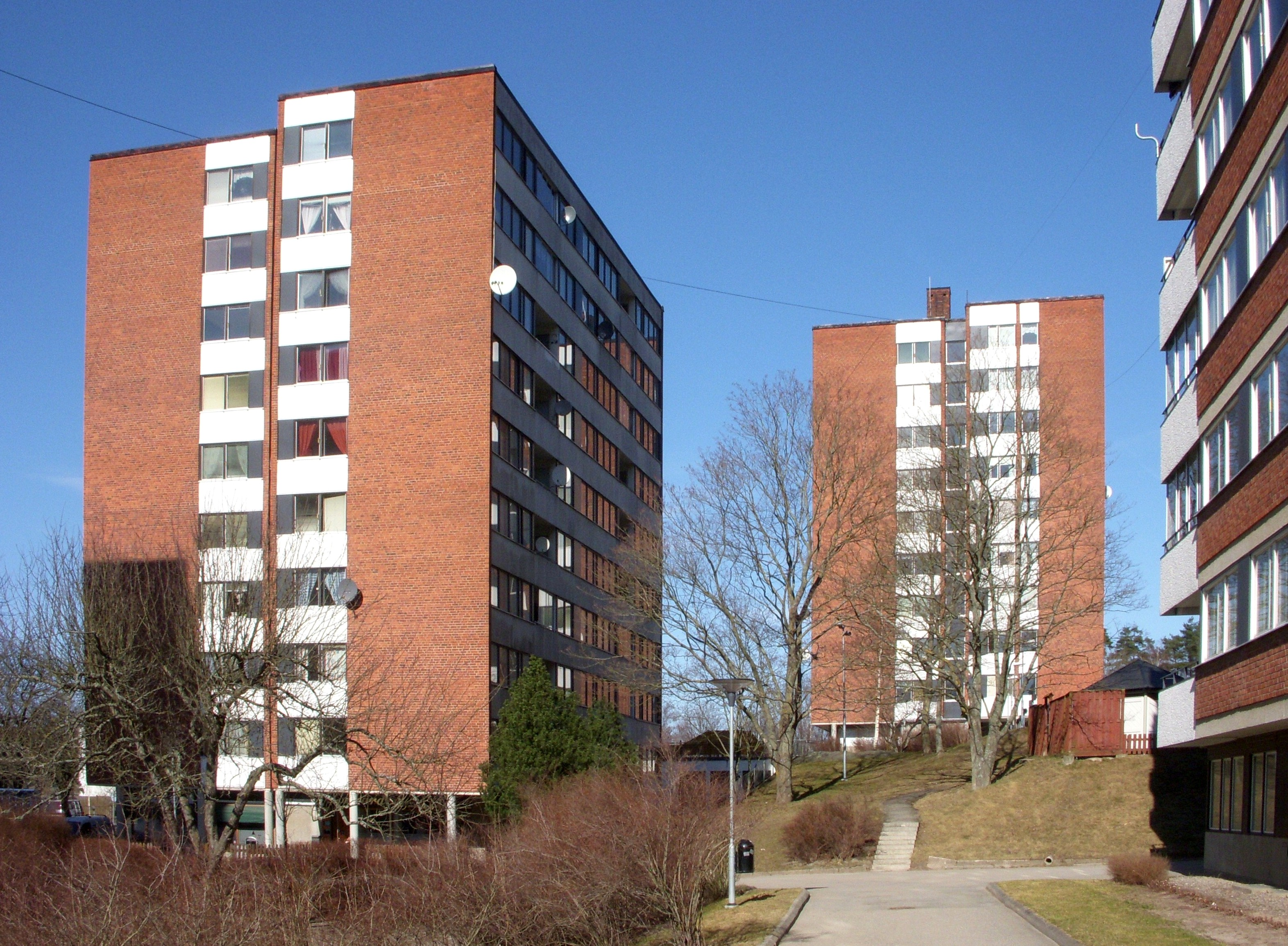 Bostadshus (punkthus) "Ormen Långe", Masmo